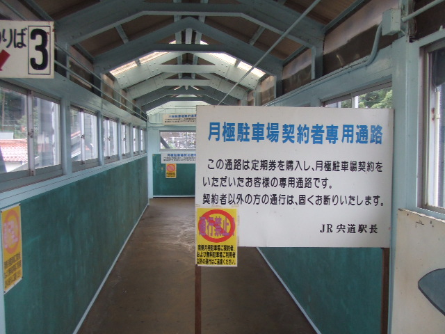 宍道駅 跨線橋